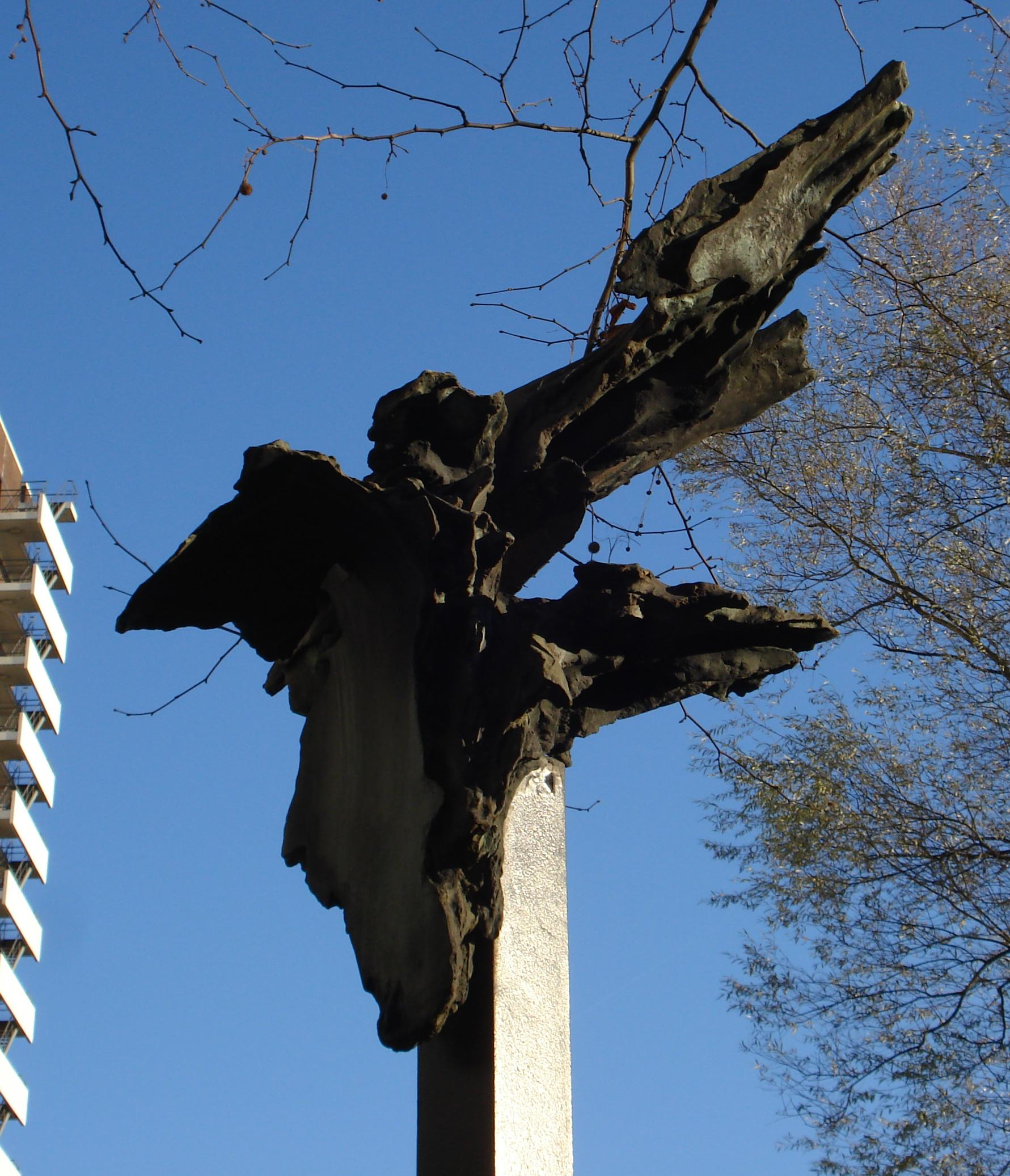 Rotterdam, Maasboulevard bij Havenziekenhuis. Kunstwerk zonder titel (1966) van Francesco Somaini. Rotterdam/The Netherlands.